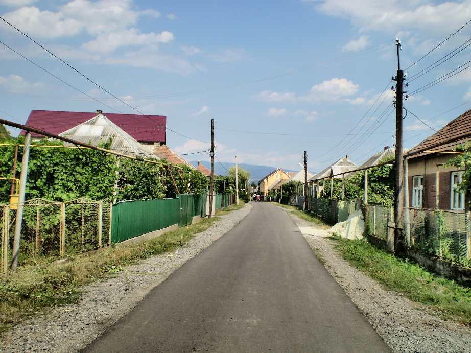 смт Кольчино Мукачевського району.